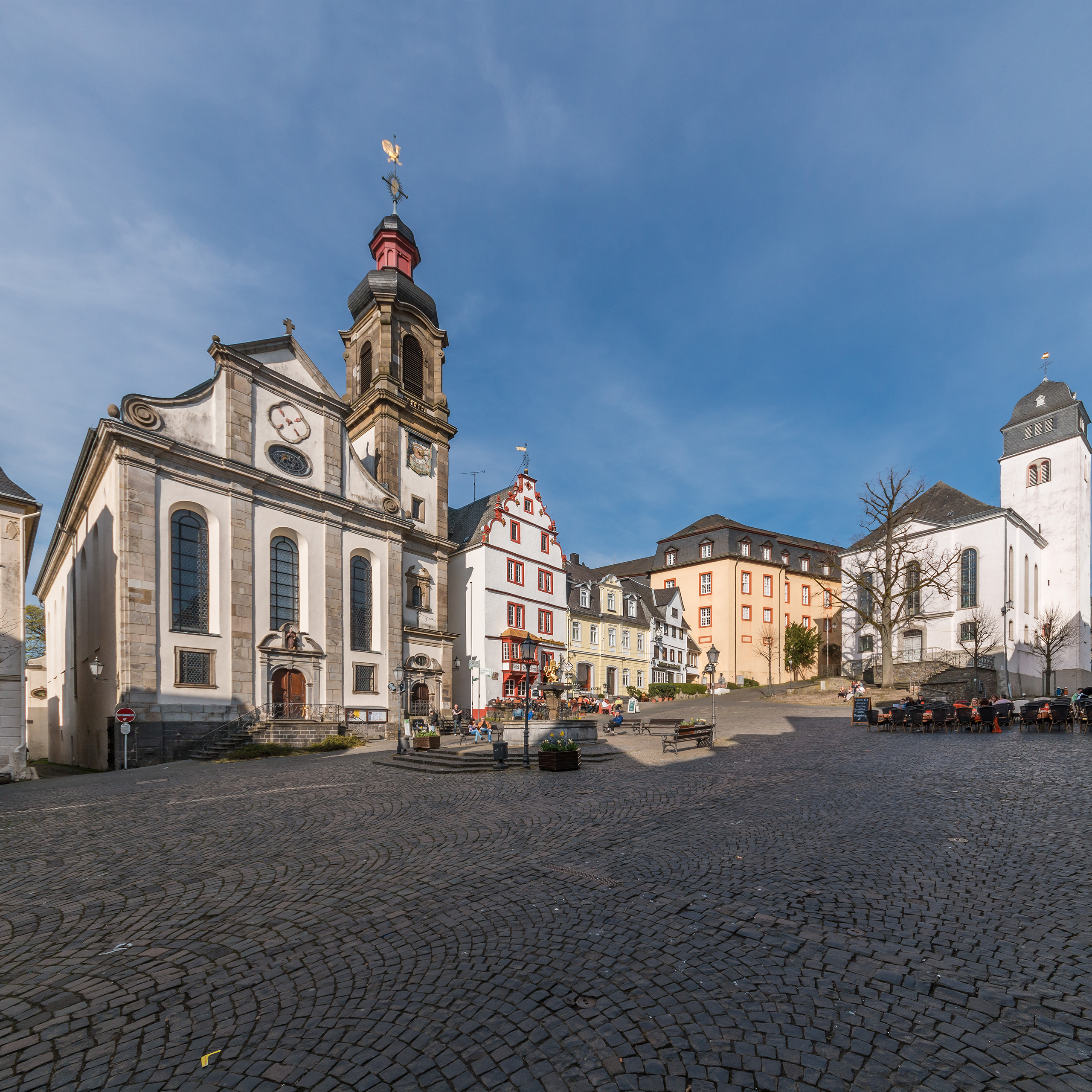 Der Alte Markt in Hachenburg im Westerwald. Links die Franziskanerkirche Maria Himmelfahrt, daneben das Hotel zur Krone, das Gasthaus zum Weißen Roß, das Schloss und die Schlosskirche